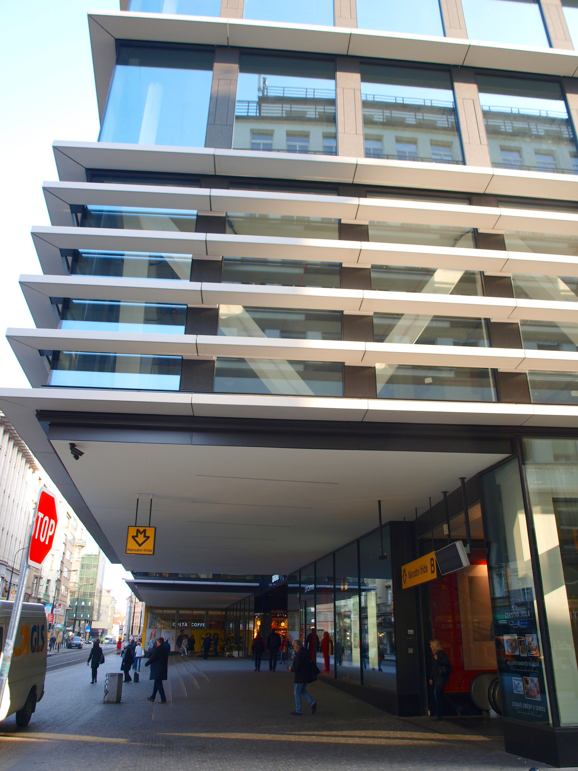 Quadrio Praha